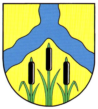 Wappen.